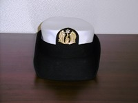 WAVE曹士正帽